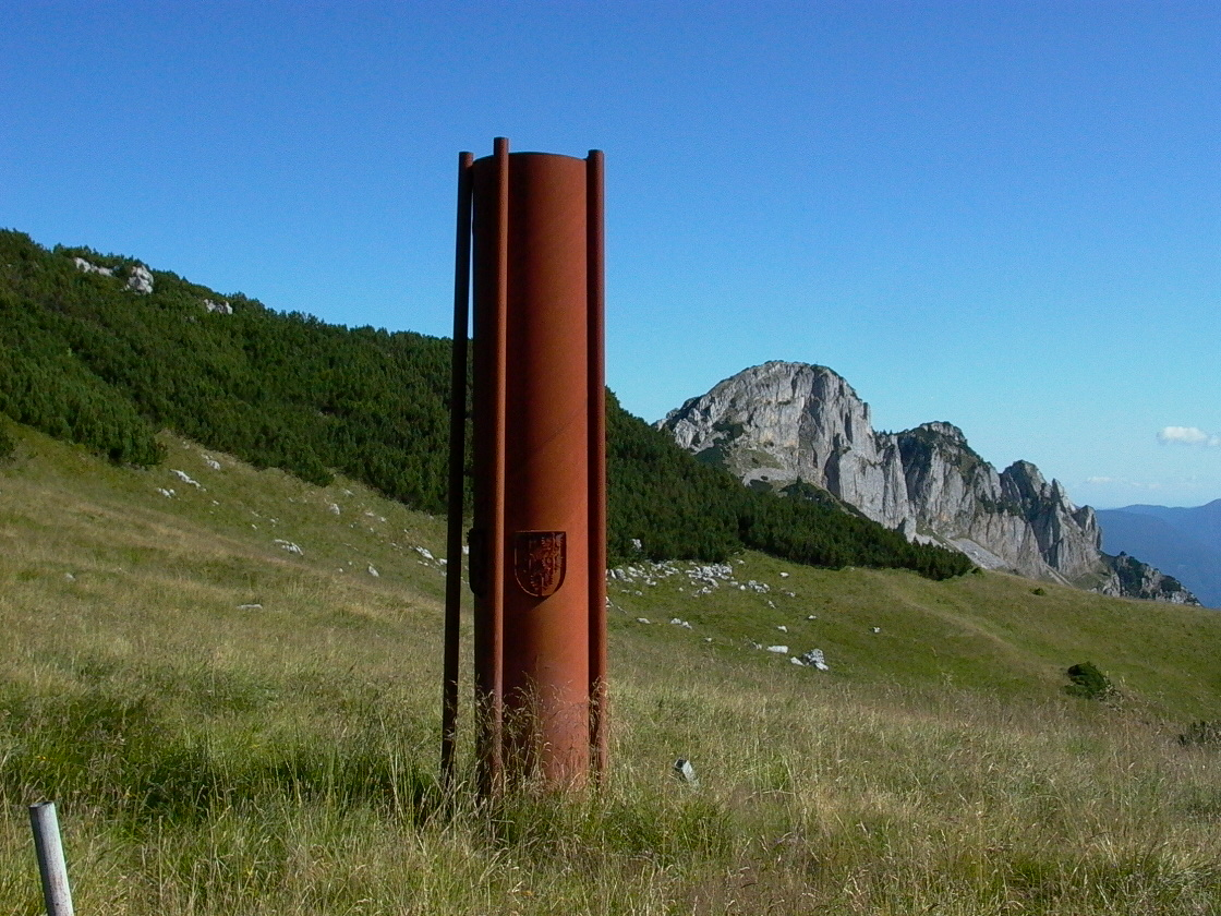 Die Dreiklangskulptur steht als verbindendes Element im "Dreiländereck" von Niederösterreich, Oberösterreich und der Steiermark. Im Hintergrund die Stumpfmauer (1770m), die höchste Erhebung der Voralpe